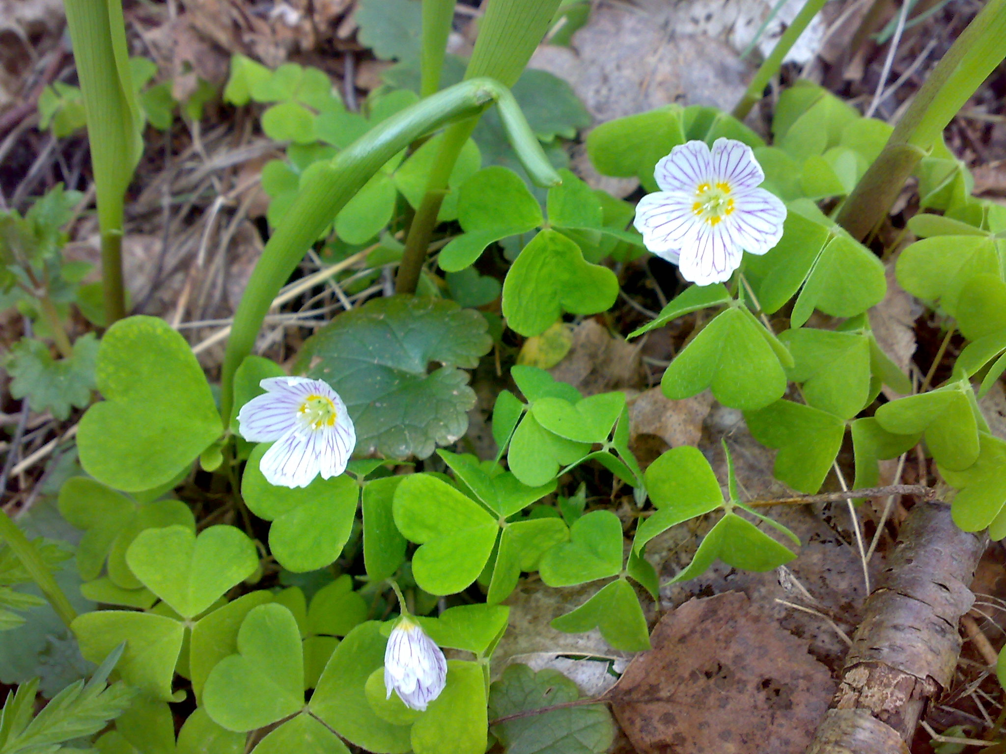 Gjøksyre Gaukesyre Oxalis acetosella Norway